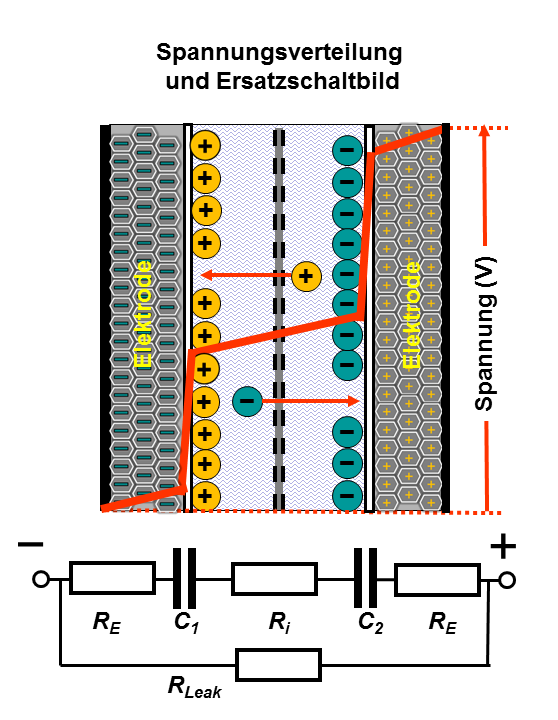 Spannungsverteilung und aus dem Aufbau resultierendes Ersatzschaltbild eines Doppelschichtkondensators